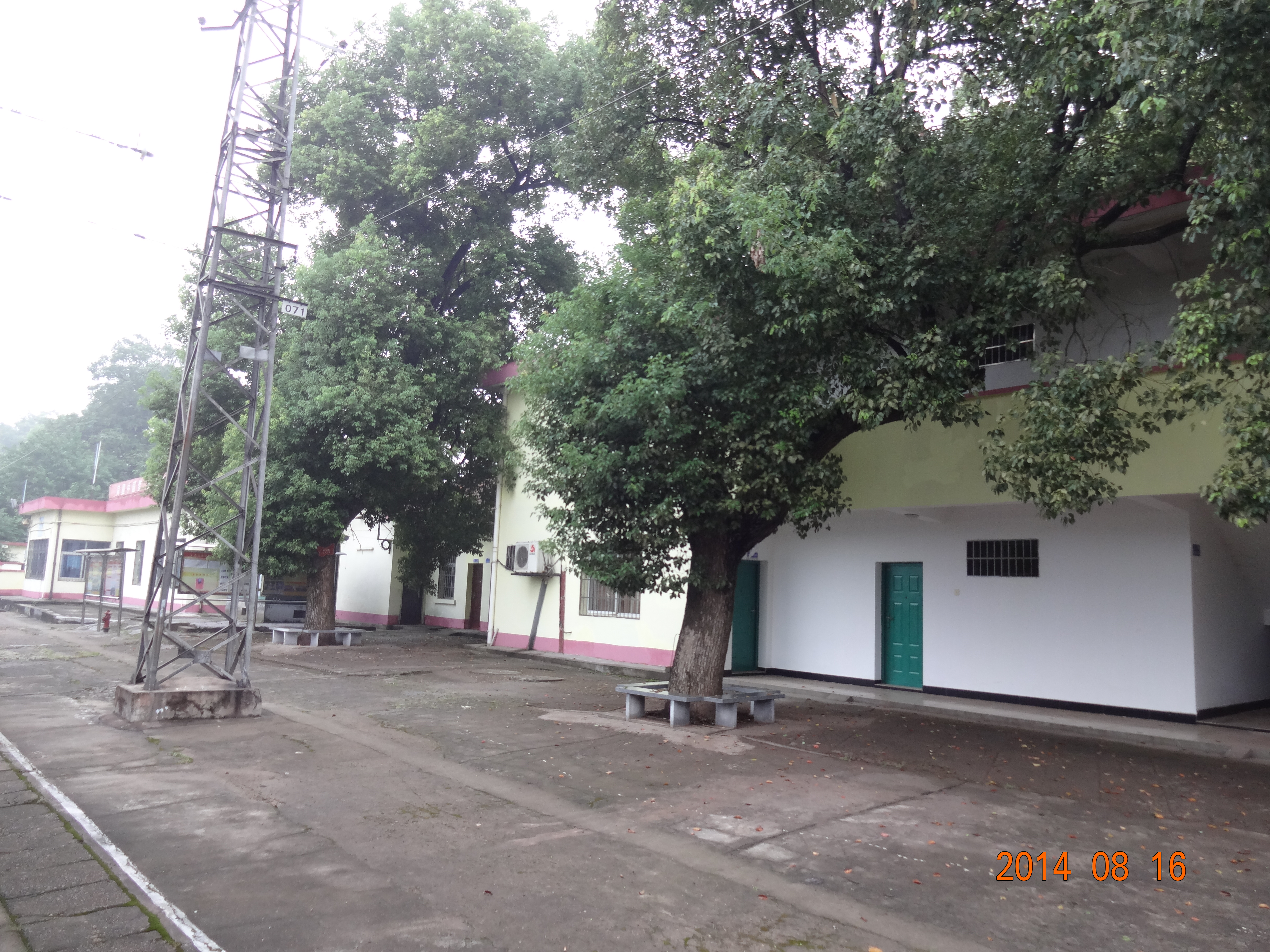 白马垅站